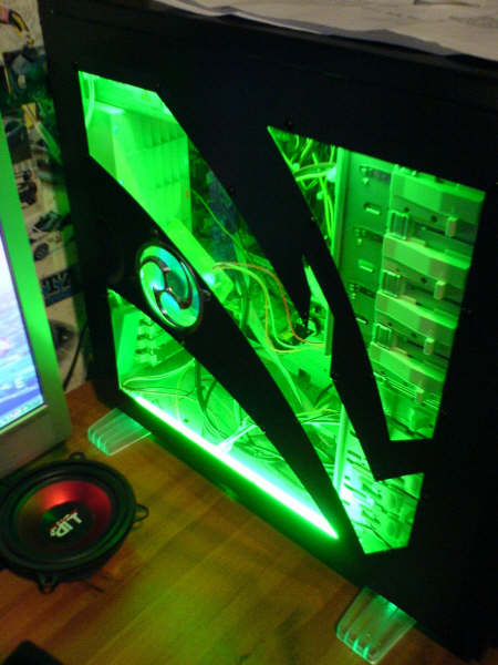 Un PC prétuné egalement comportant 2 néons vert et divers ventilos à LED vertes